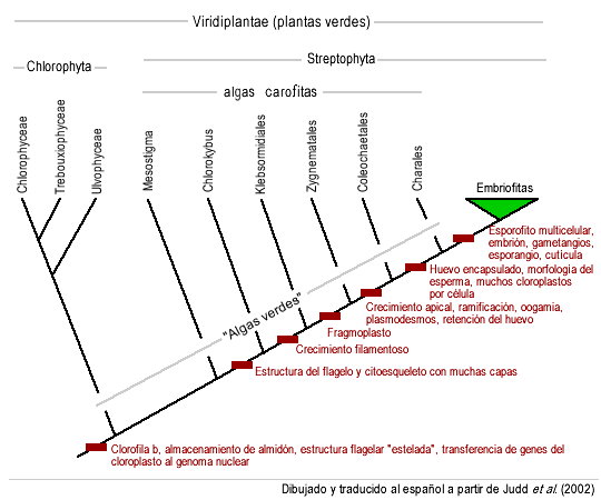 Árbol filogenético de las Viridofitas. Dibujado y traducido al español a partir de Judd et al.' (2002).